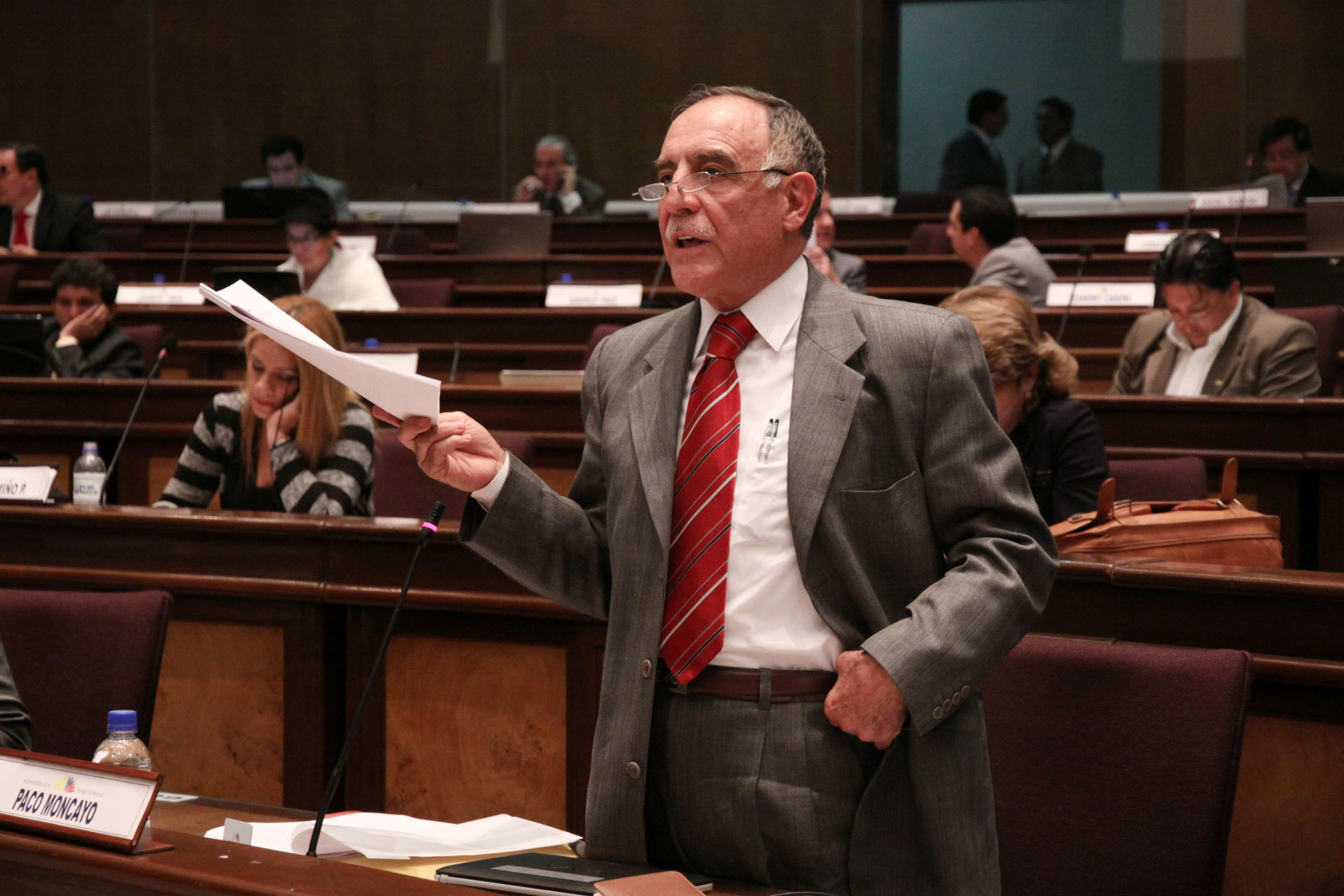 18 de Marzo de 2010